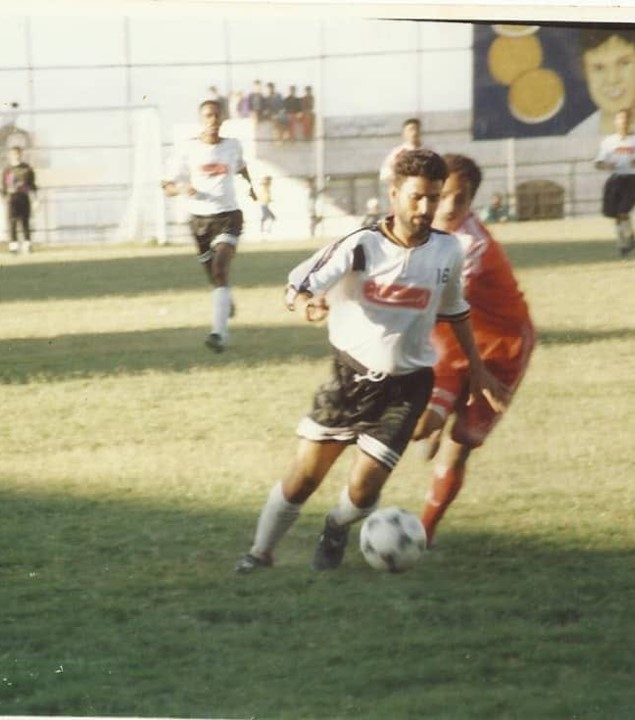 الكابتن أسعد المقطري في إحدى مبارايات الدوري العام لعام 1996 أمام نادي الإتحاد اليمني